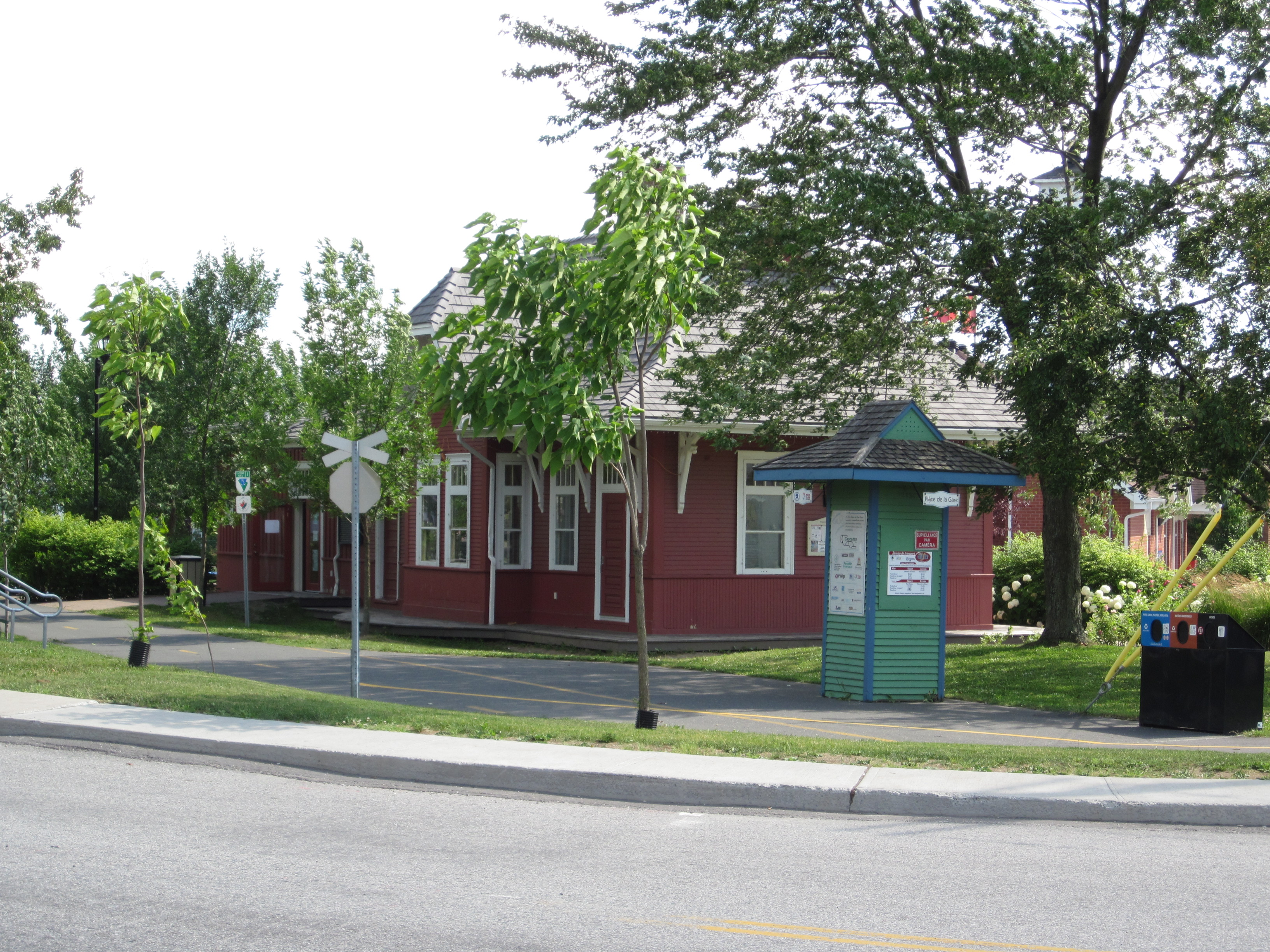 Vélo-gare de Warwick